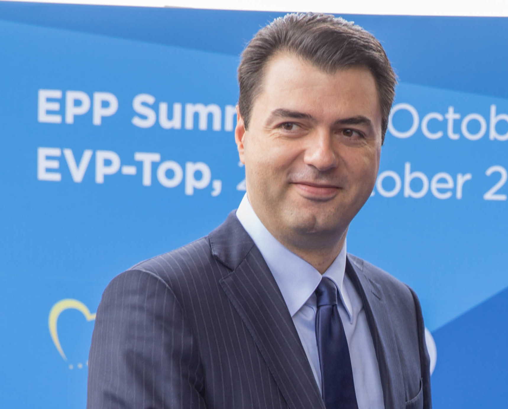 EPP Summit, Maastricht, October 2016